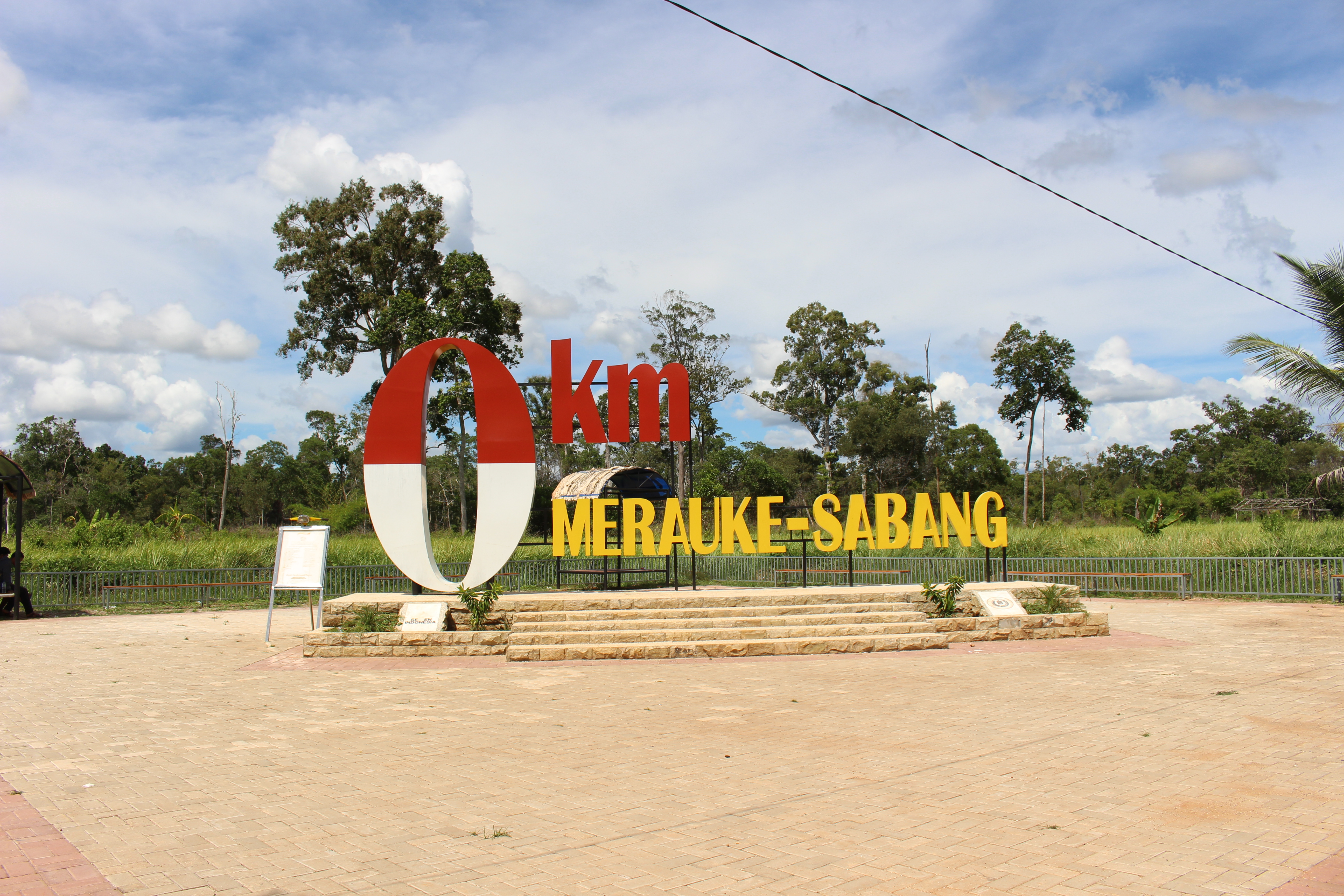 Taman 0 Kilometer yang berada di Distrik Sota, Merauke, perbatasan Republik Indonesia - Papua New Guinea.